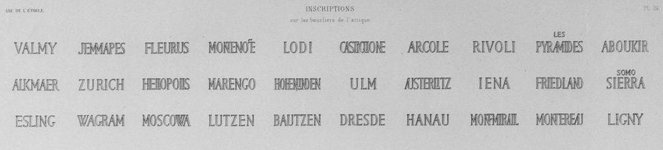 Die Namen der Schlachten, die auf den Schilden des obersten umlaufenden Frieses am Triumphbogen in Paris eingraviert sind.